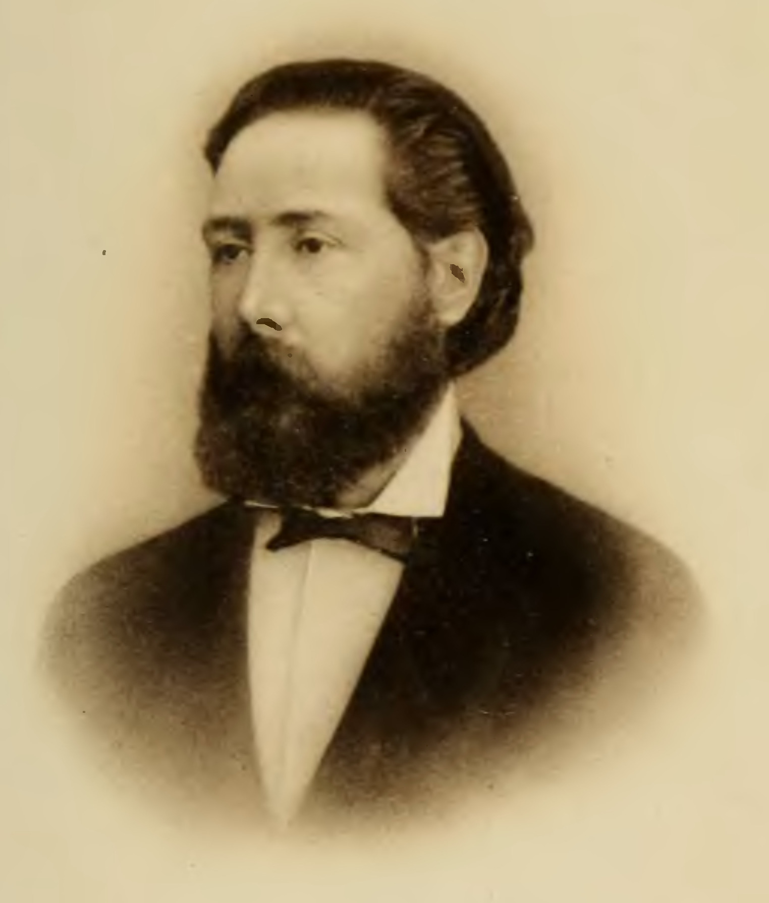 Biografía de Eduardo Wilde, por la casa editorial